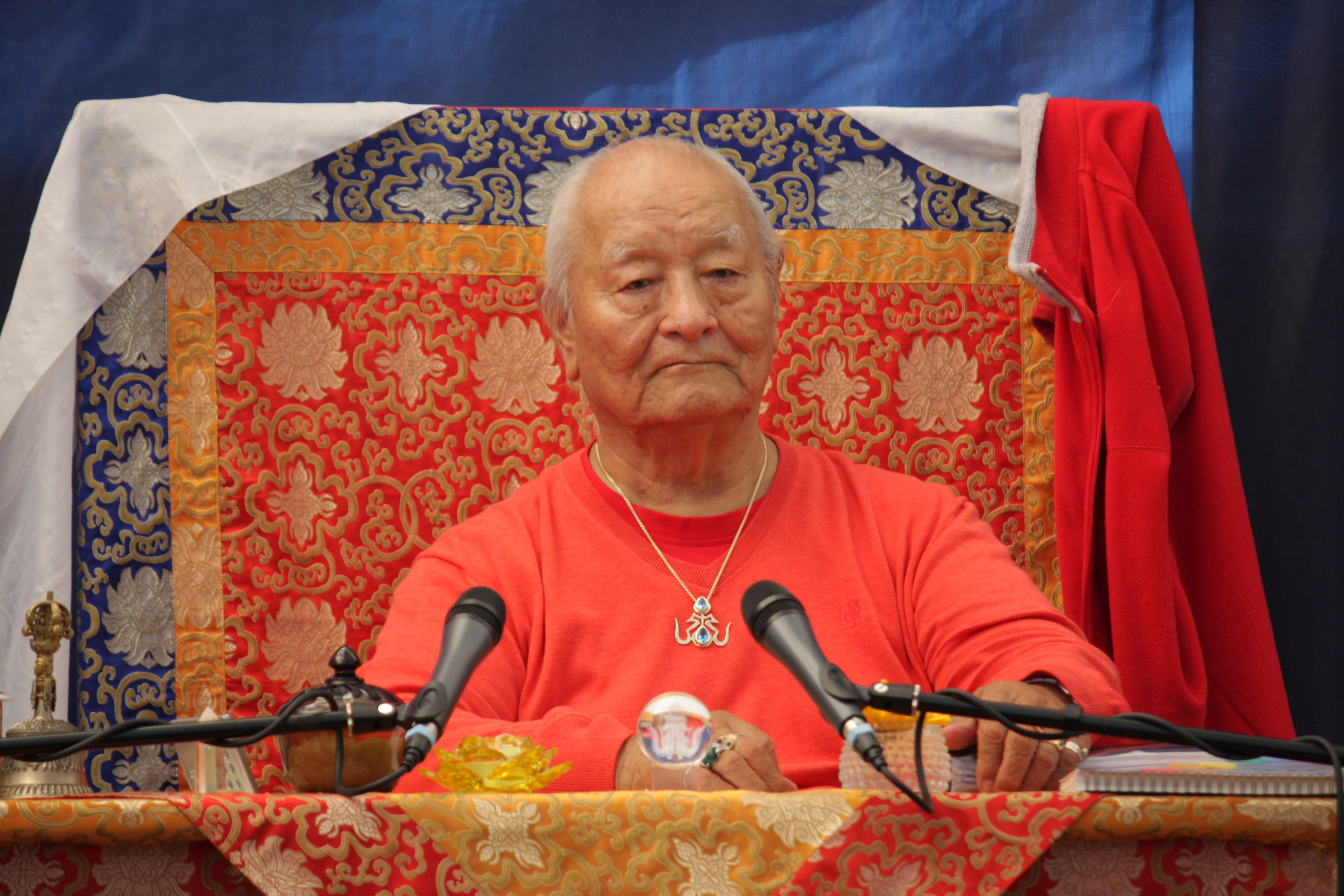 Чогьял Намкай Норбу Римпоче, Северный Кунсангар